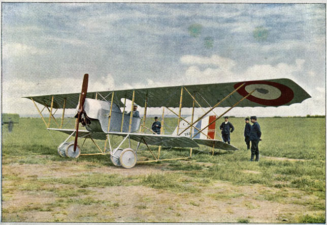 Autochrome de Gervais-Courtellemont publié dans Les Champs de Bataille de la Marne sous le titre : Un_avion_de_guerre et la_journée_9_sept_14 venant de la bibliothèque de Reims sous la référence : RG_38,_n°8_p113.